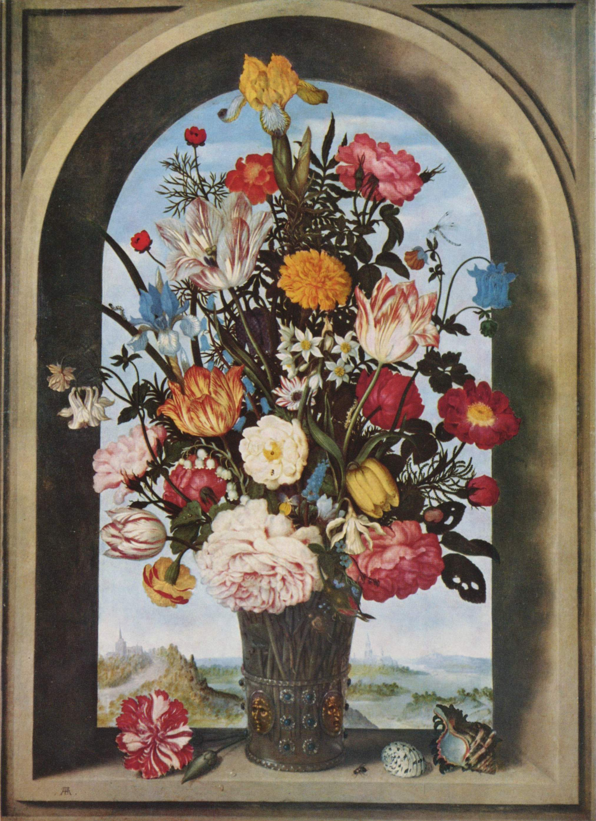 Still Life